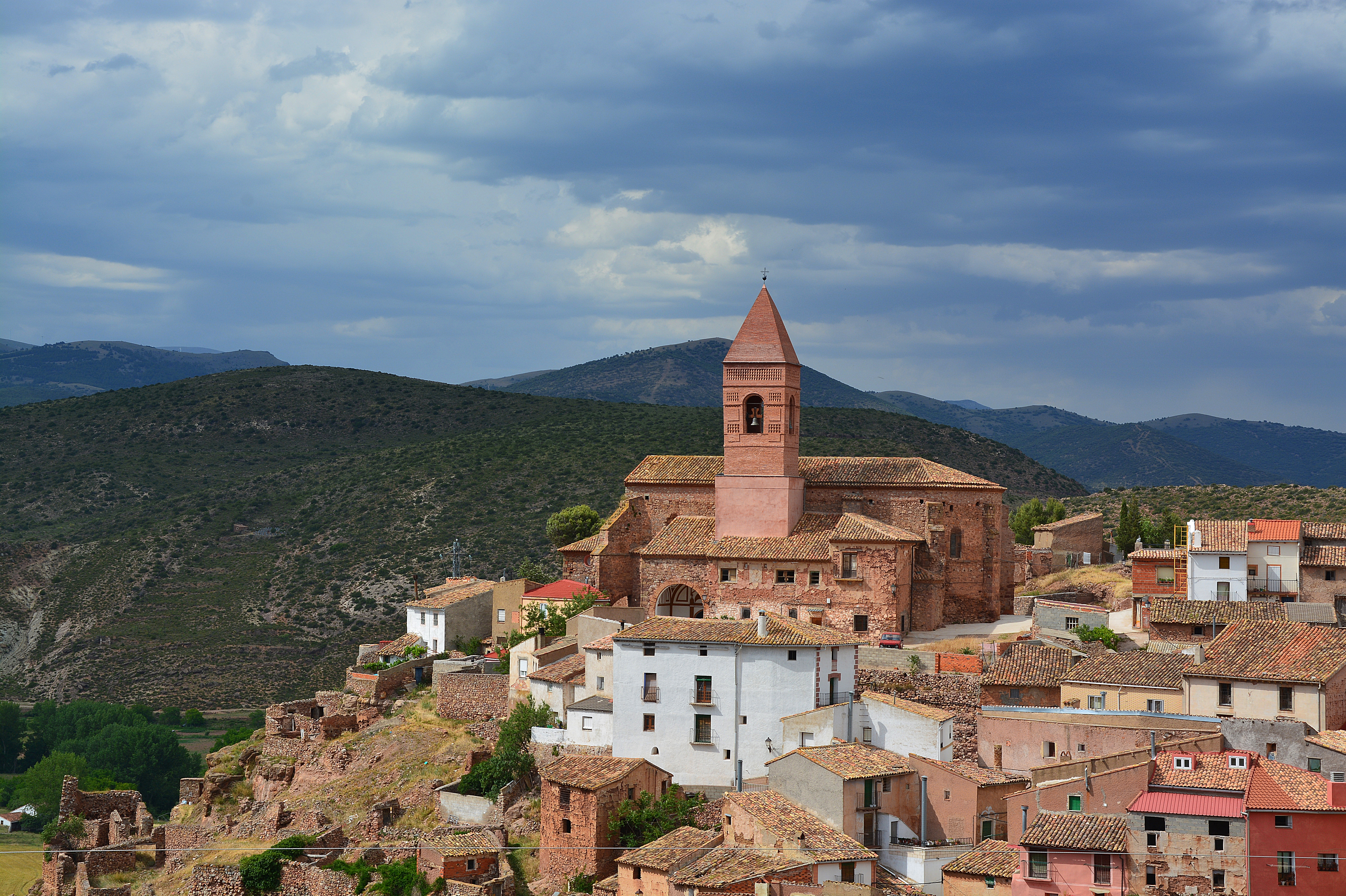 IGLESIA DE LA ASUNCIÓN DE NUESTRA SEÑORA (ARANDA DE MONCAYO)